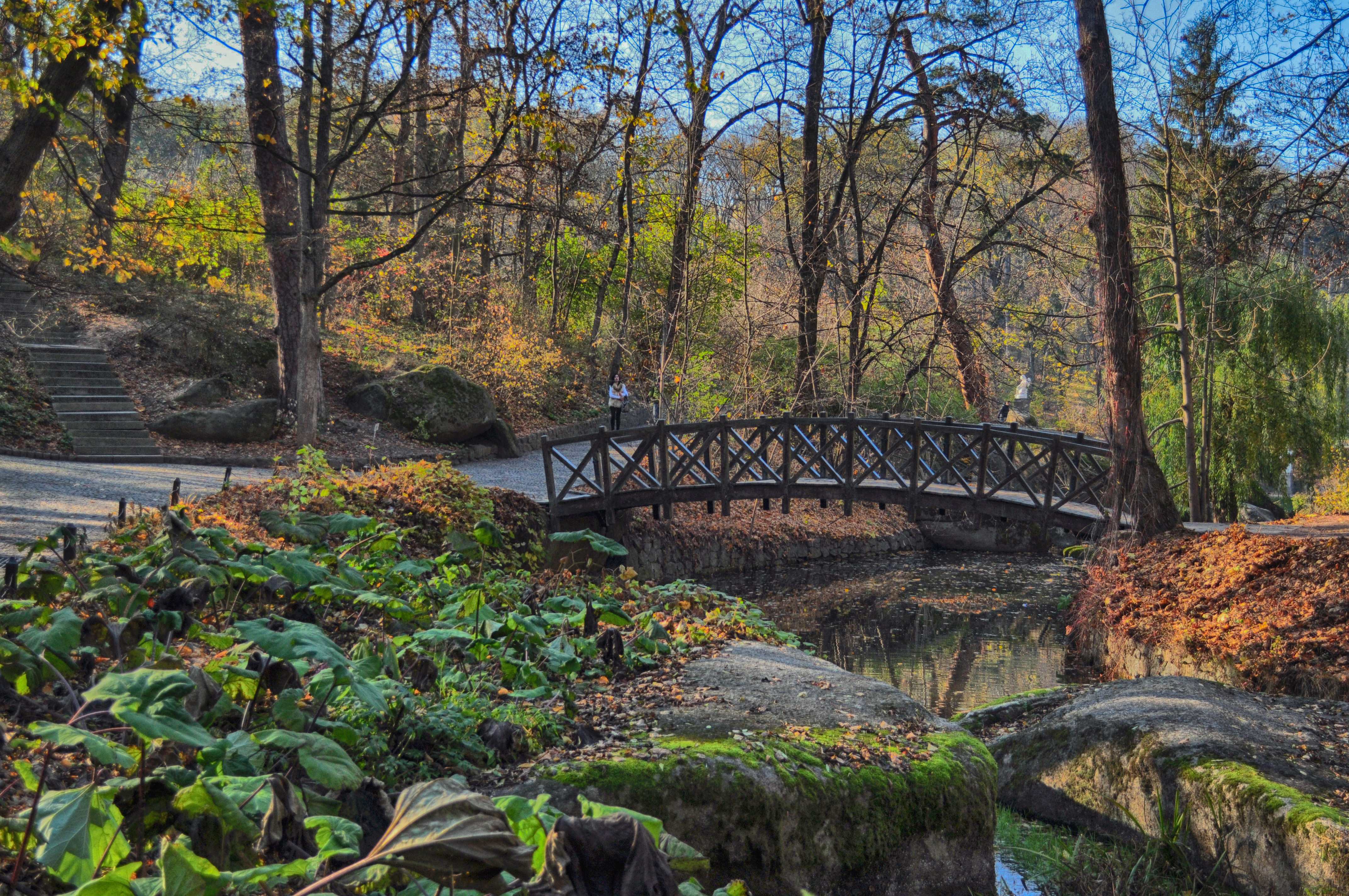 «Софіївка», Уманський район, м. Умань